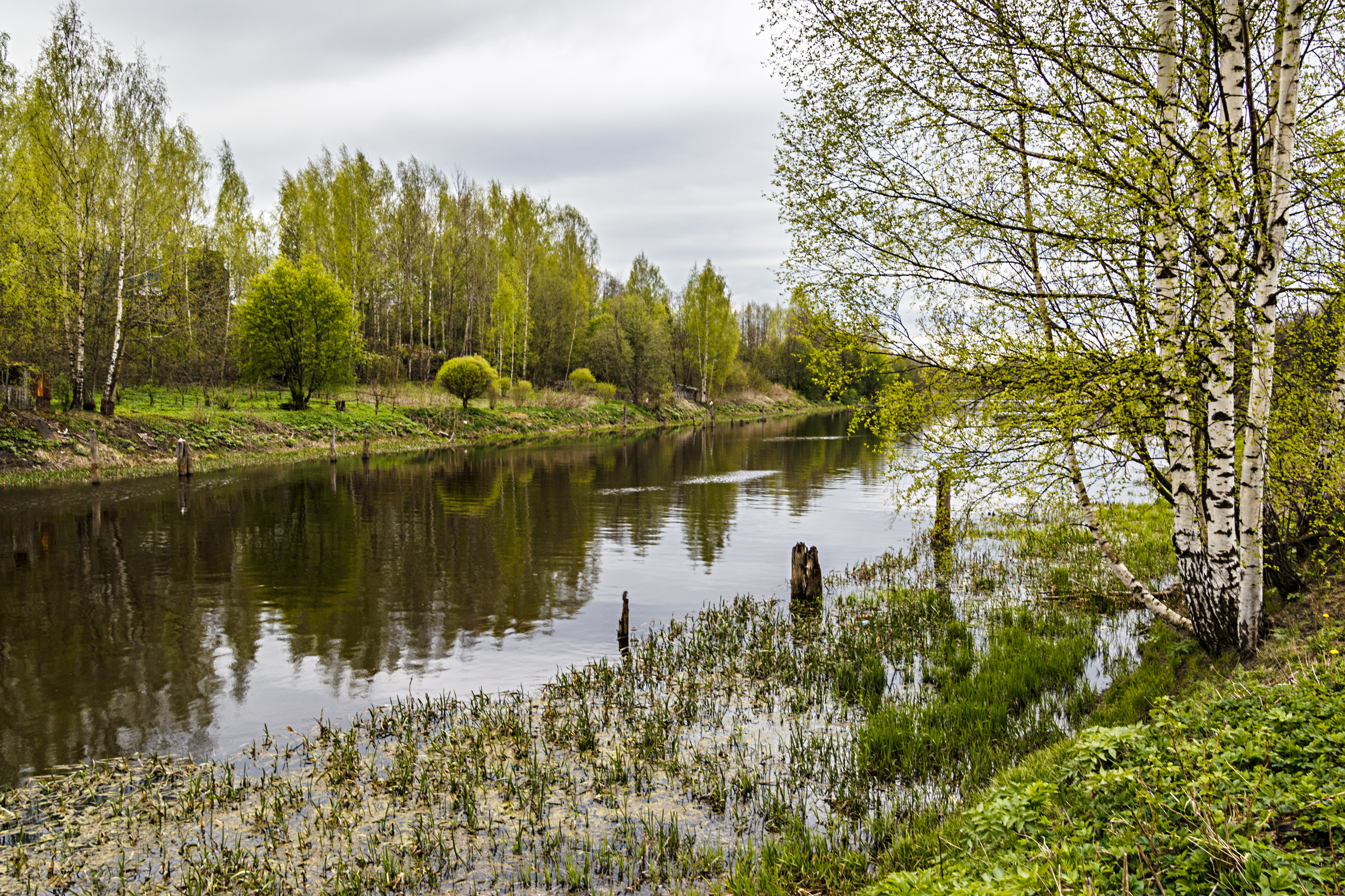 Приток реки Ижоры, долина реки Большая Ижорка, Санкт-Петербург This image is related to the protected area of Russia number 7810048